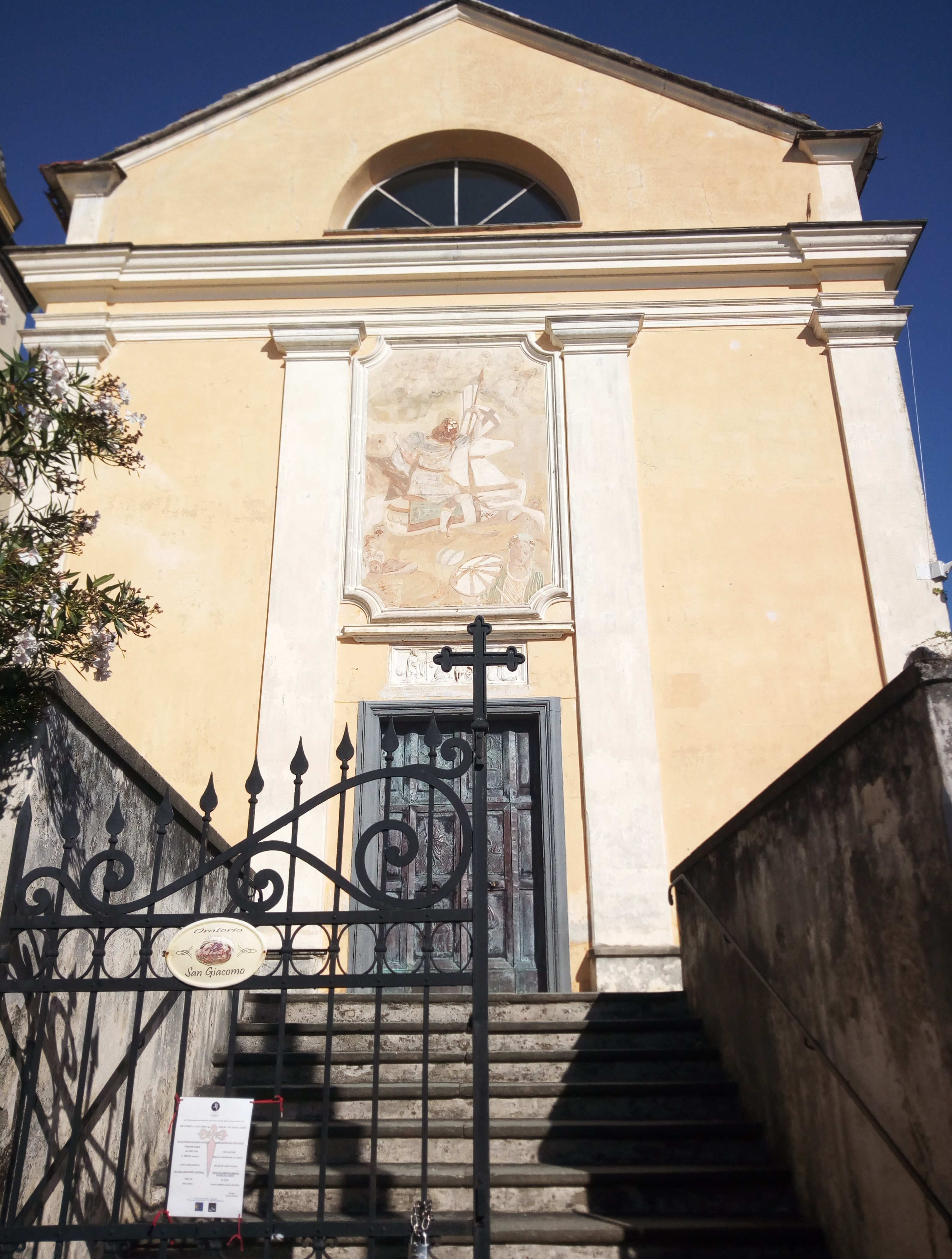 Oratorio San Giacomo, Levanto (Italie)